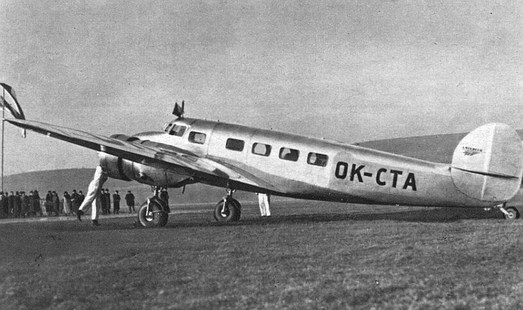 letoun Lockheed L-10 Electra (OK-CTA) provozovaný společností Baťa